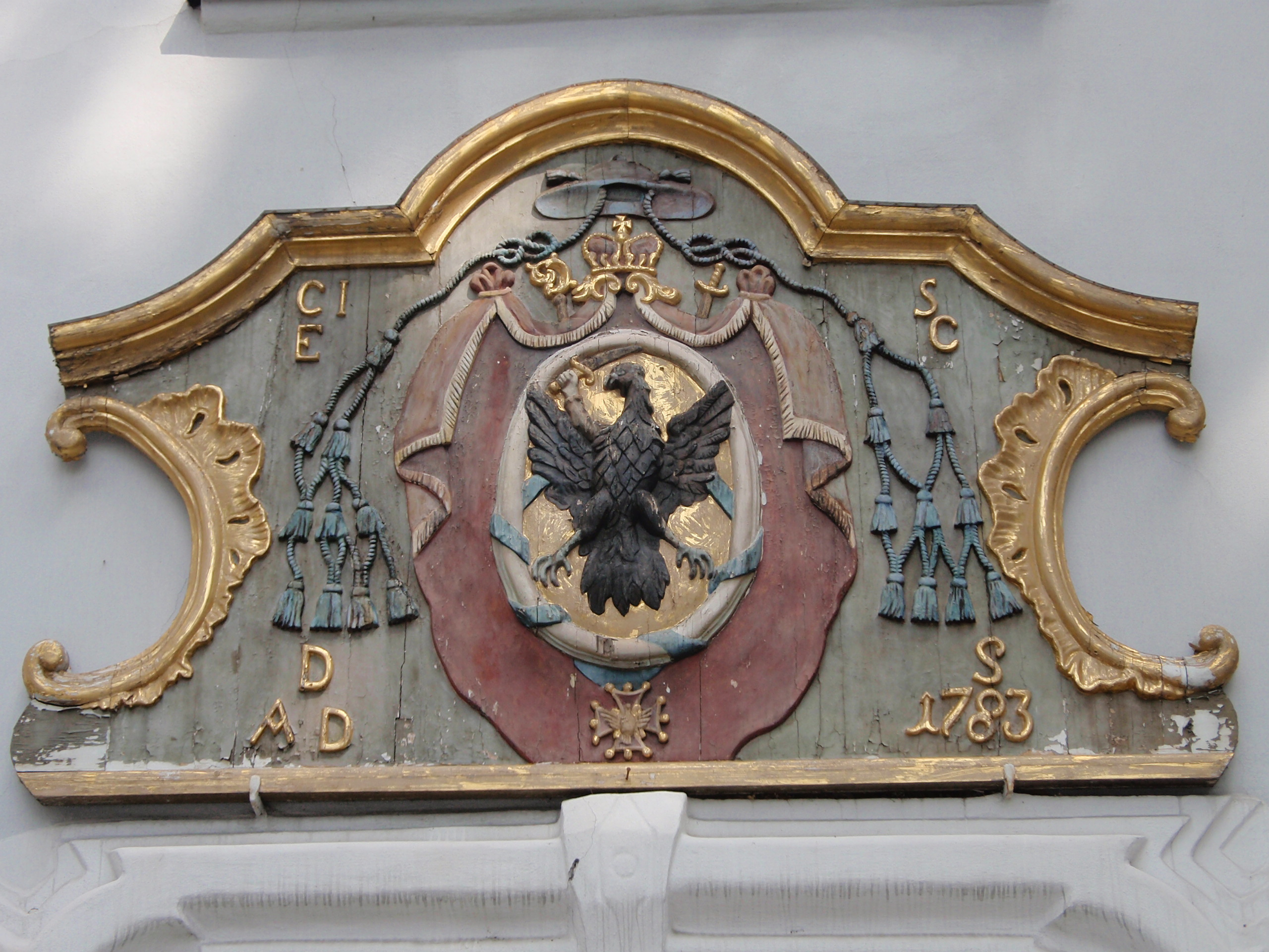 Kościół św. Macieja Apostoła w Siewierzu (woj. śląskie)